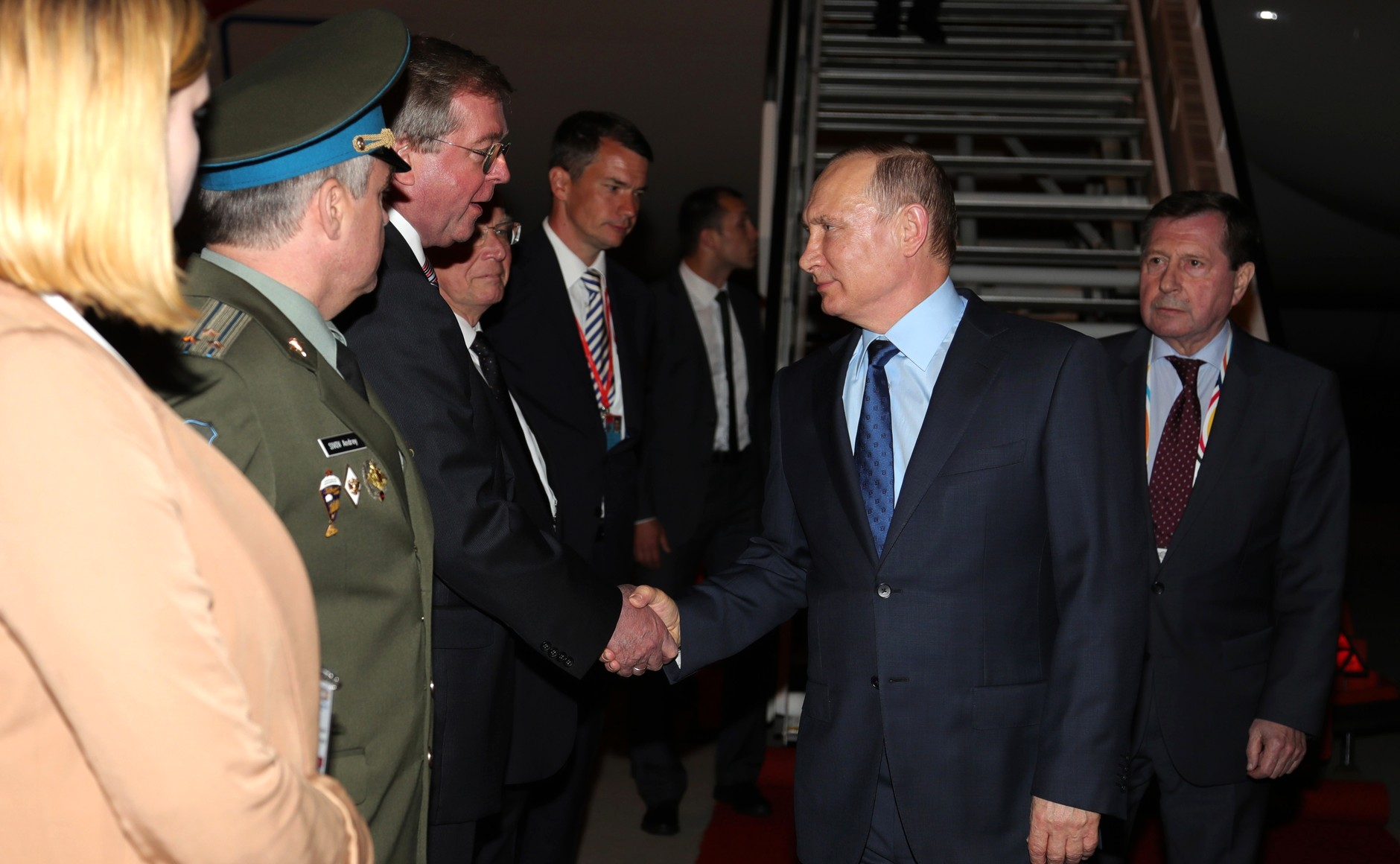 Прибытие Президента России Владимира Путина в Гамбург для участия я саммите «Группы двадцати»